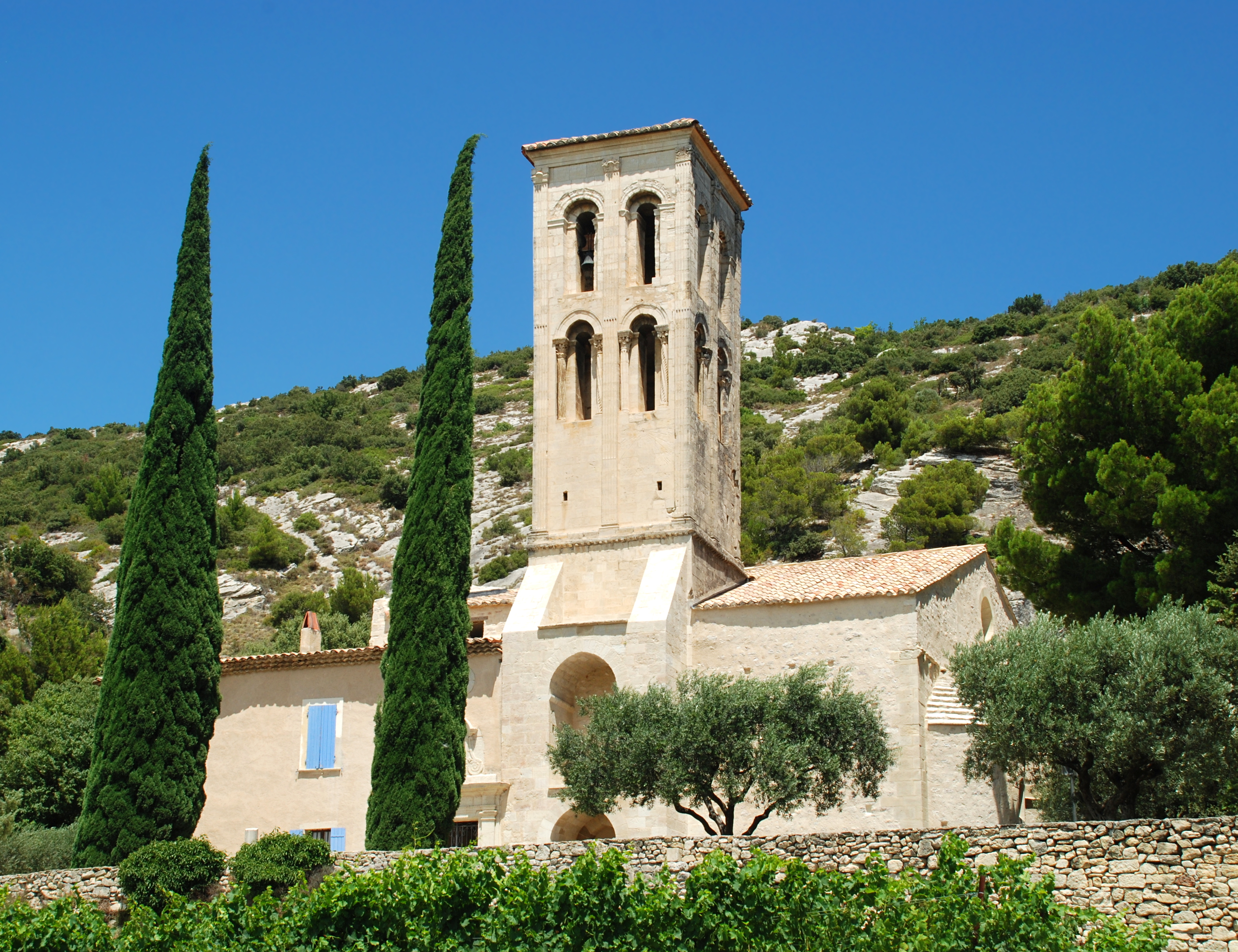 France - Vaucluse - Chapelle Notre-Dame d'Aubune